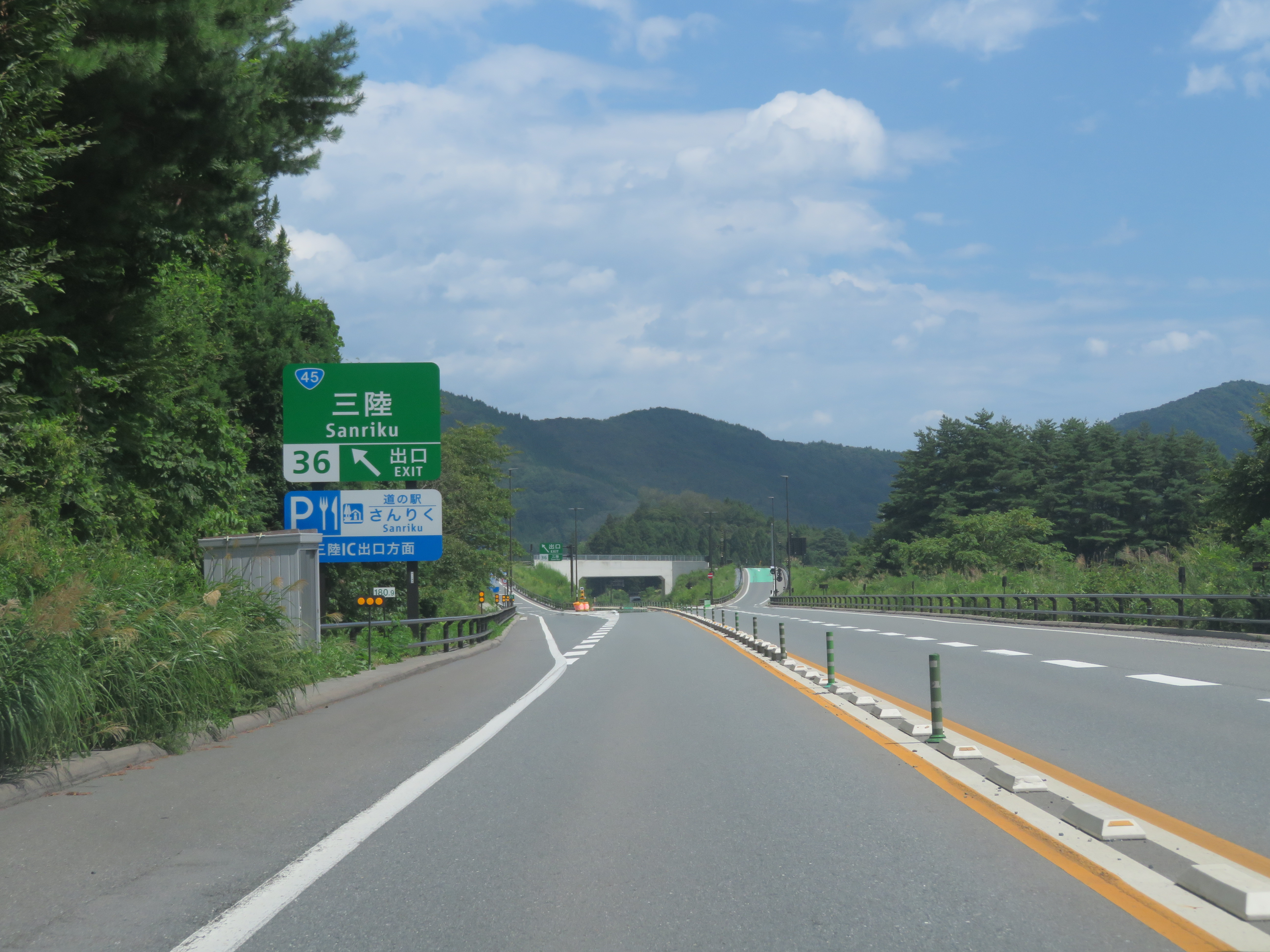 三陸自動車道三陸インターチェンジ（大船渡方面側出口付近） !Canon PowerShot SX720 HS